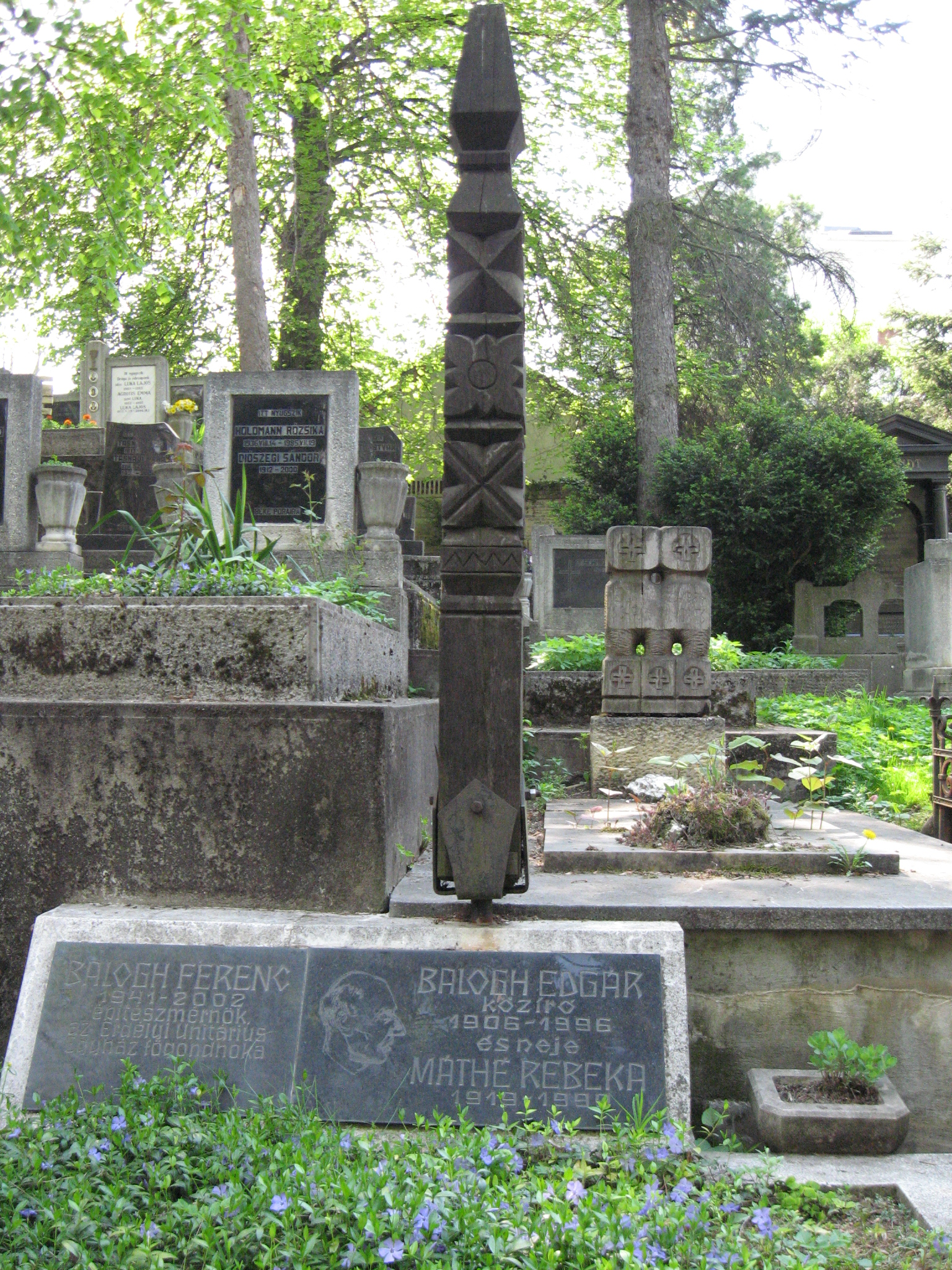 Balogh Edgár sírja a kolozsvári Házsongárdi temetőben.